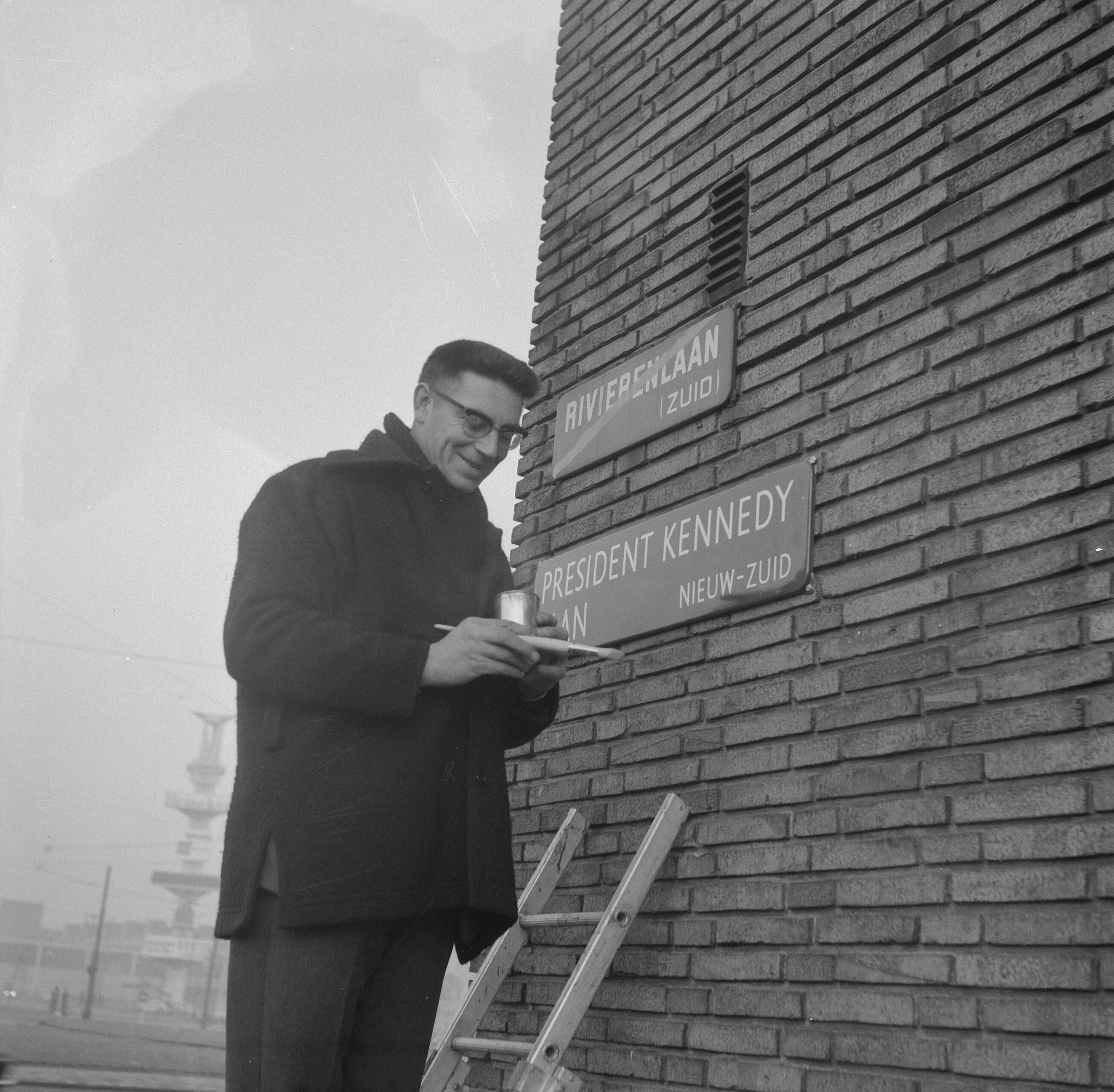 Collectie / Archief : Fotocollectie Anefo Reportage / Serie : [ onbekend ] Beschrijving : Rivierenlaan werd President Kennedylaan te Amsterdam Datum : 20 januari 1964 Locatie : Amsterdam, Noord-Holland Fotograaf : Nijs, Jac. de / Anefo Auteursrechthebbende : Nationaal Archief Materiaalsoort : Negatief (zwart/wit) Nummer archiefinventaris : bekijk toegang 2.24.01.03 Bestanddeelnummer : 915-9646